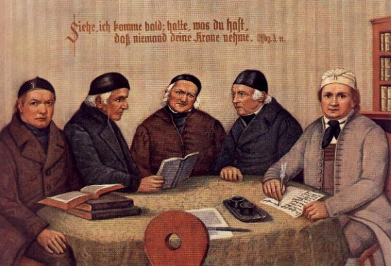 "Fünf-Brüder-Bild" (Persönlichkeiten des württembergischen Pietismus.Von links nach rechts Johannes Schnaitmann (1767-1847) Anton Egeler (1770-1850) Johann Martin Schäffer (1763-1851) Immanuel Gottlieb Kolb (1784-1859) Johann Michael Hahn (1758-1819) und ein leerer Stuhl (Einladung an den Betrachter oder Sinnbild für die Gegenwart Gottes)